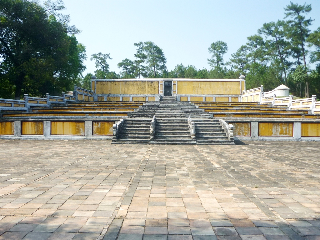 Mausolée de l'empereur Gia Long près de Hué - Vietnam